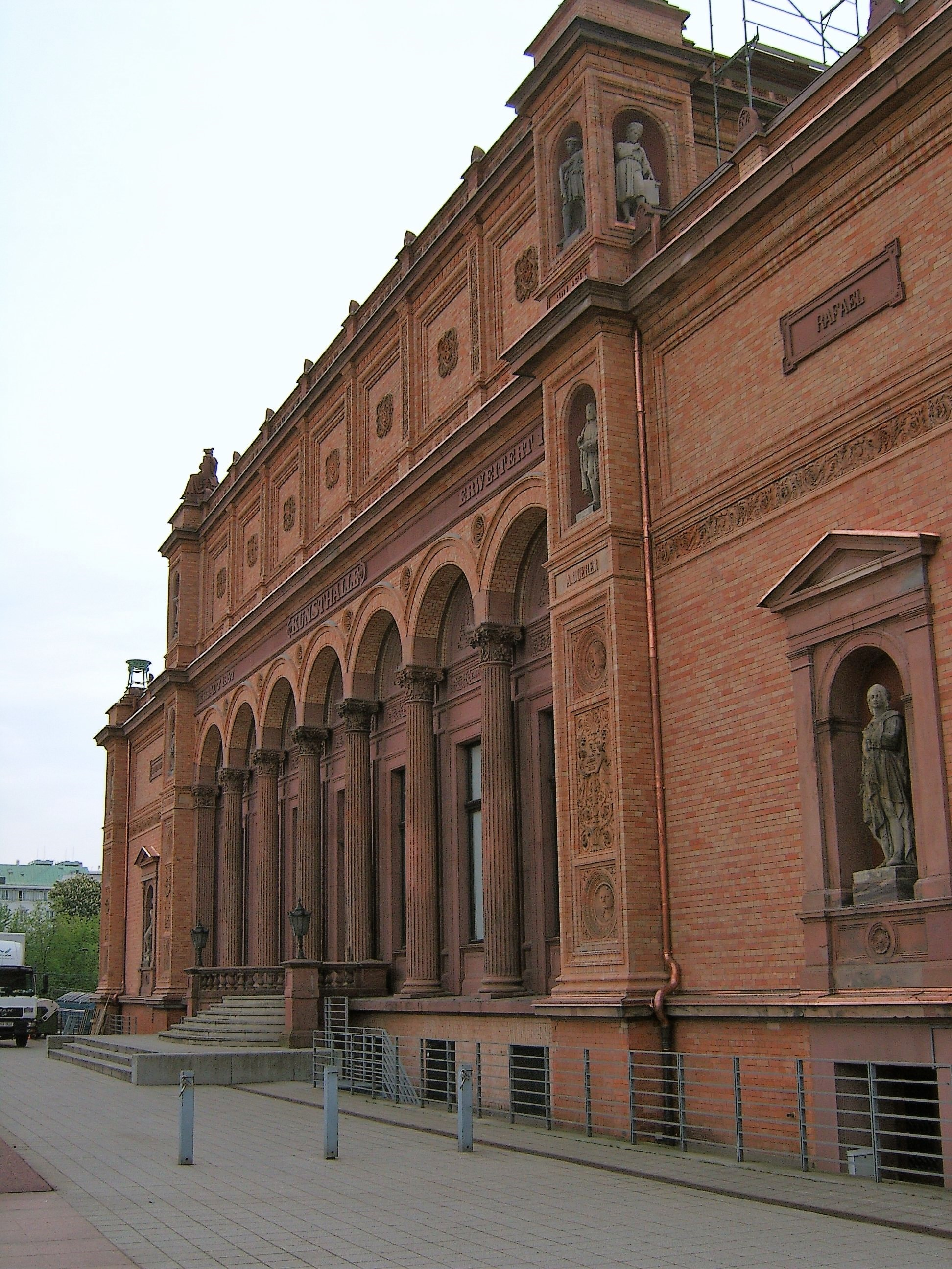 Der Altbau der Hamburger Kunsthalle wurde 1869 durch Georg Theodor Schirrmacher und Hermann von der Hude erbaut. This is a photograph of an architectural monument.